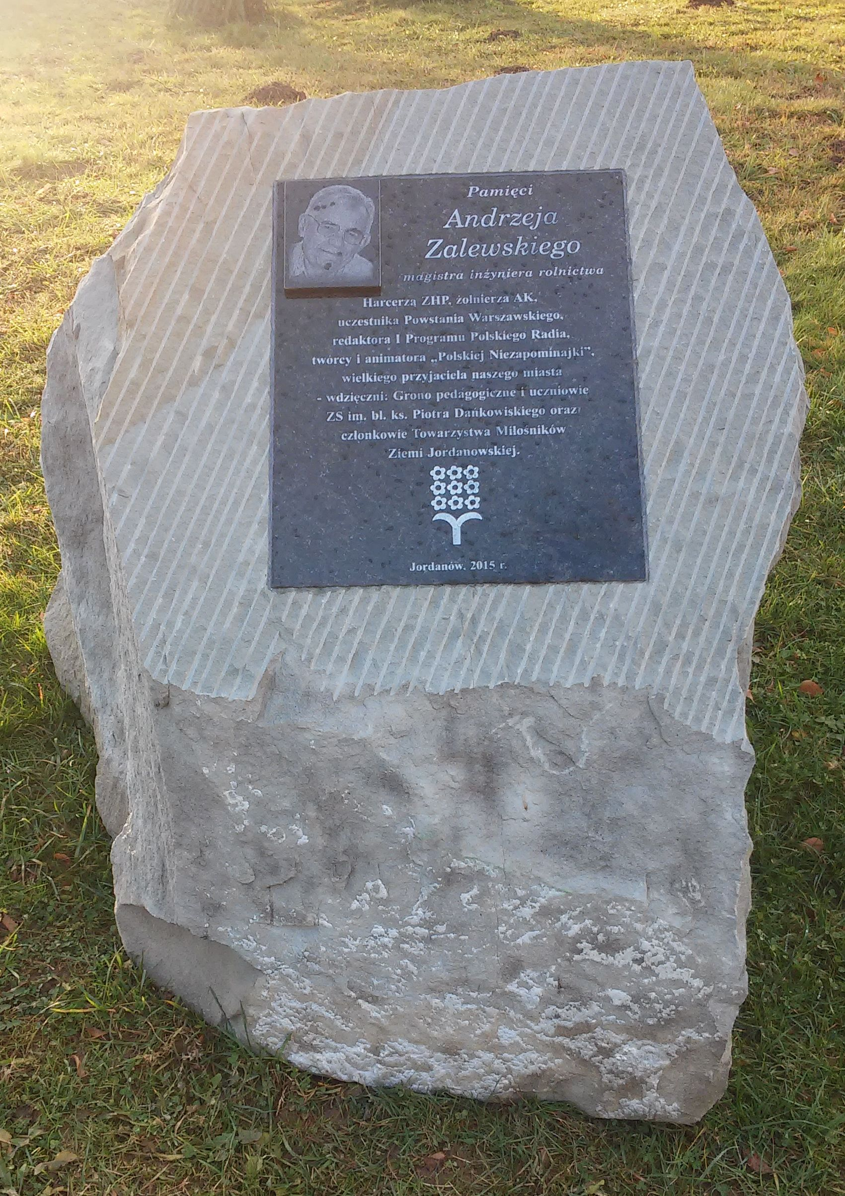 Pamiątkowy obelisk w Jordanowie ku pamięci Andrzeja Zalewskiego.